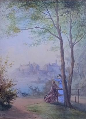 Foto eines Aquarells von Carl Hetz, 1870